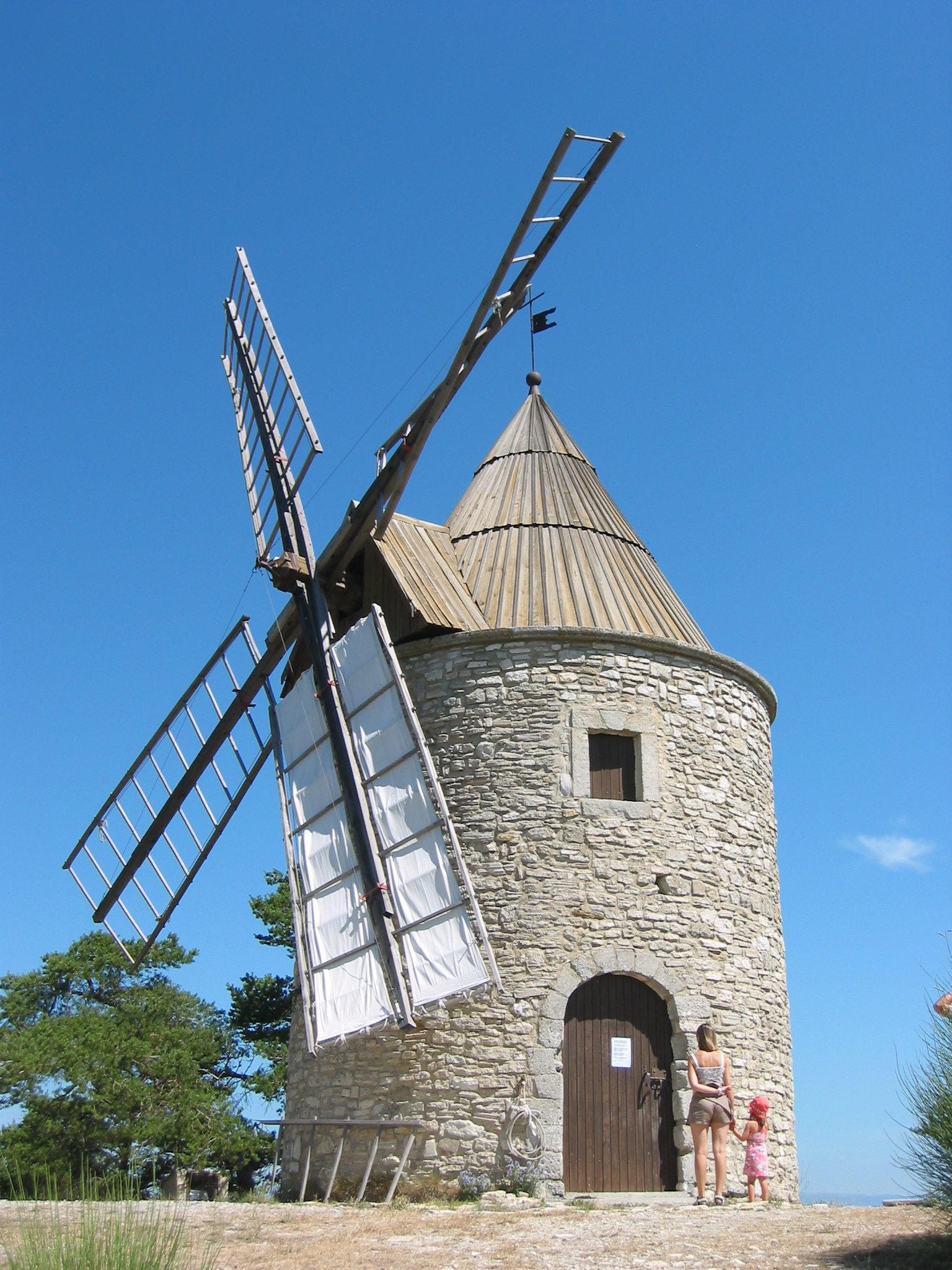 Montfuron, Alpes-de-Haute-Provence, France Le Moulin à vent. Le Moulin à vent. Les hélices ont été abimées par un orage d'été. Photo prise le 30 juillet 2006 Aut : civodule